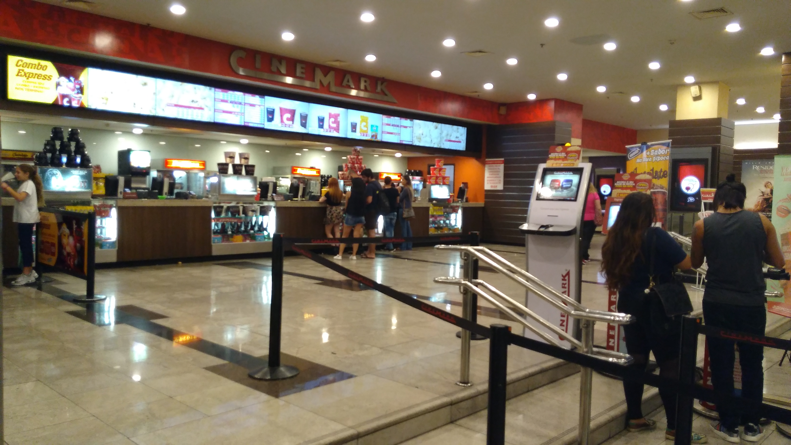 Vista da bombonière do Cinemark Market Place de São Paulo, SP